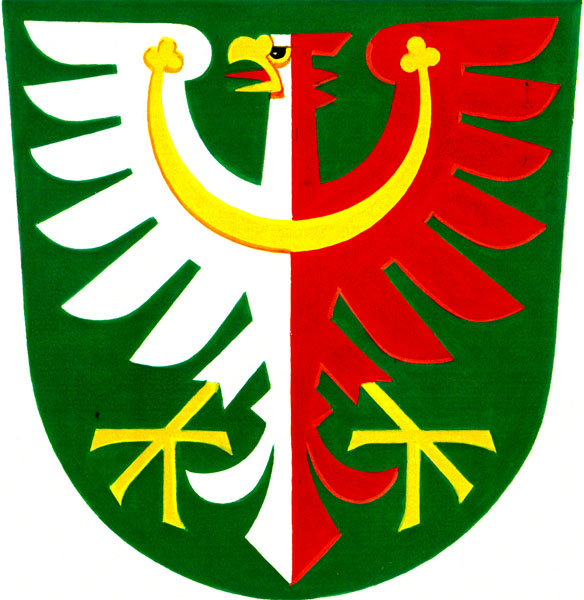 Znak obce Olbramovice